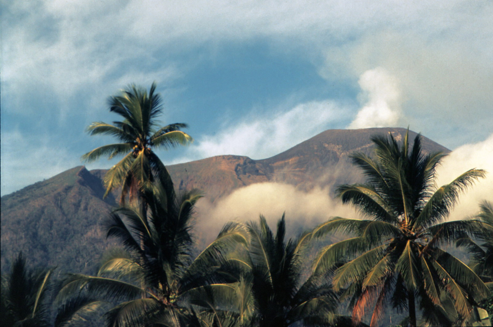 Gamalama-Volcano